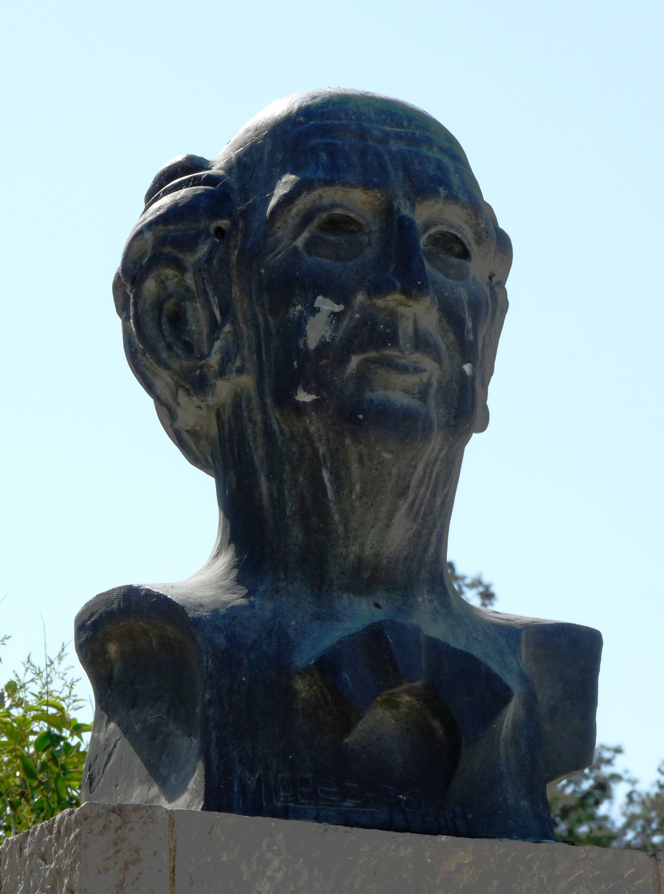 Zaragoza - Busto de Demetrio Galán Bergua: "A Demetrio Galán Bergua / Apóstol de la jota / Las asociaciones El Cachirulo de España y Venezuela"